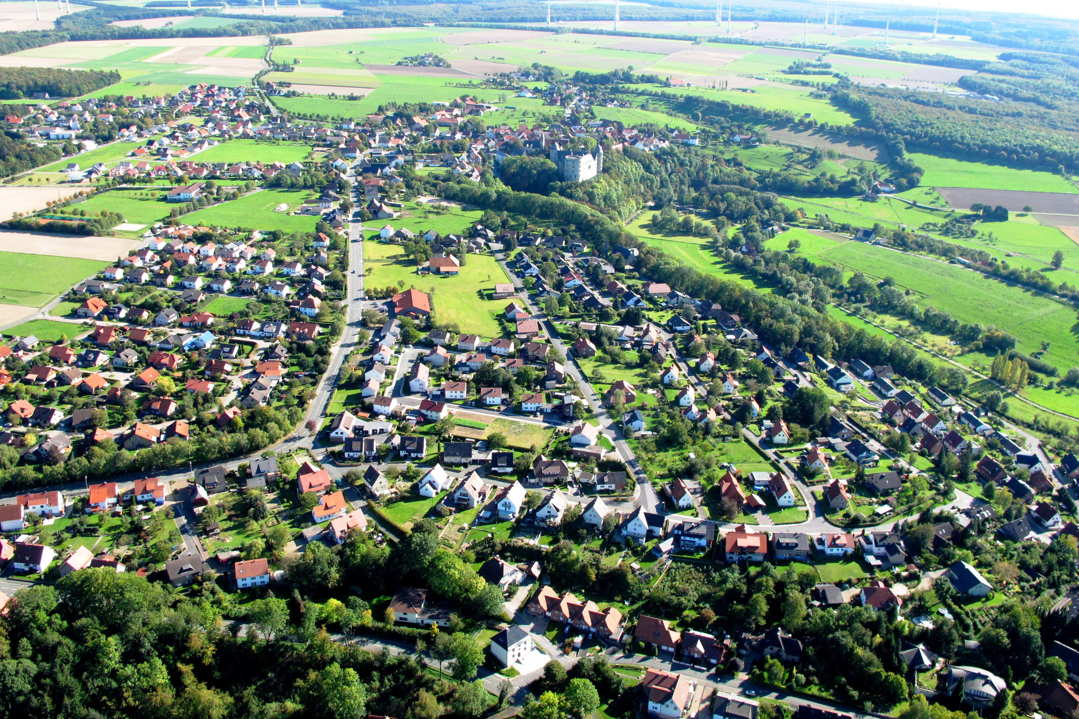 Luftbild aus Richtung Norden des Ortsteils Wewelsburg der Stadt Büren im Kreis Paderborn, Nordrhein-Westfalen, Deutschland.